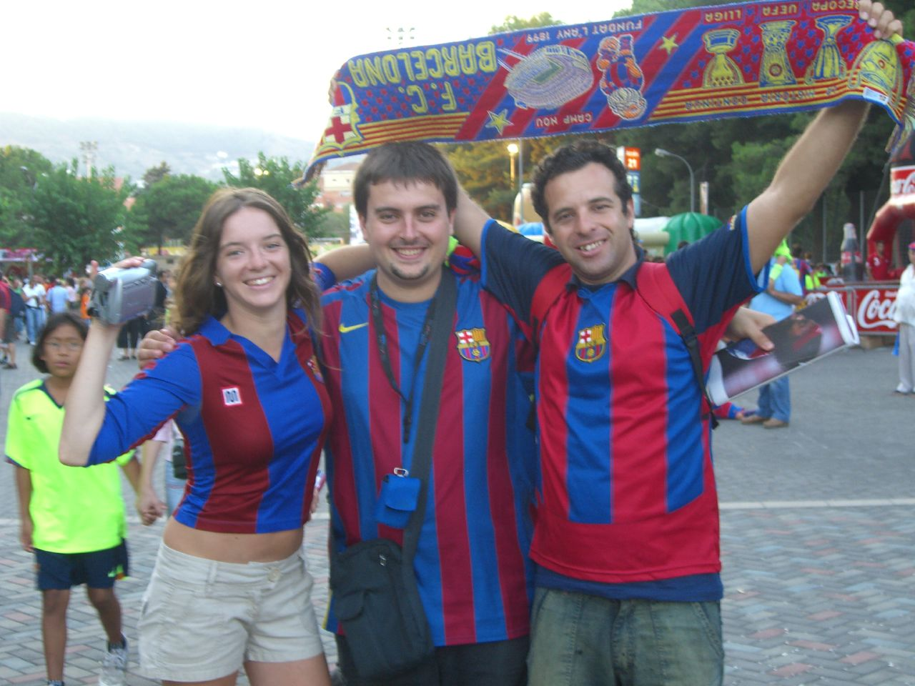 FC Barcelona fans